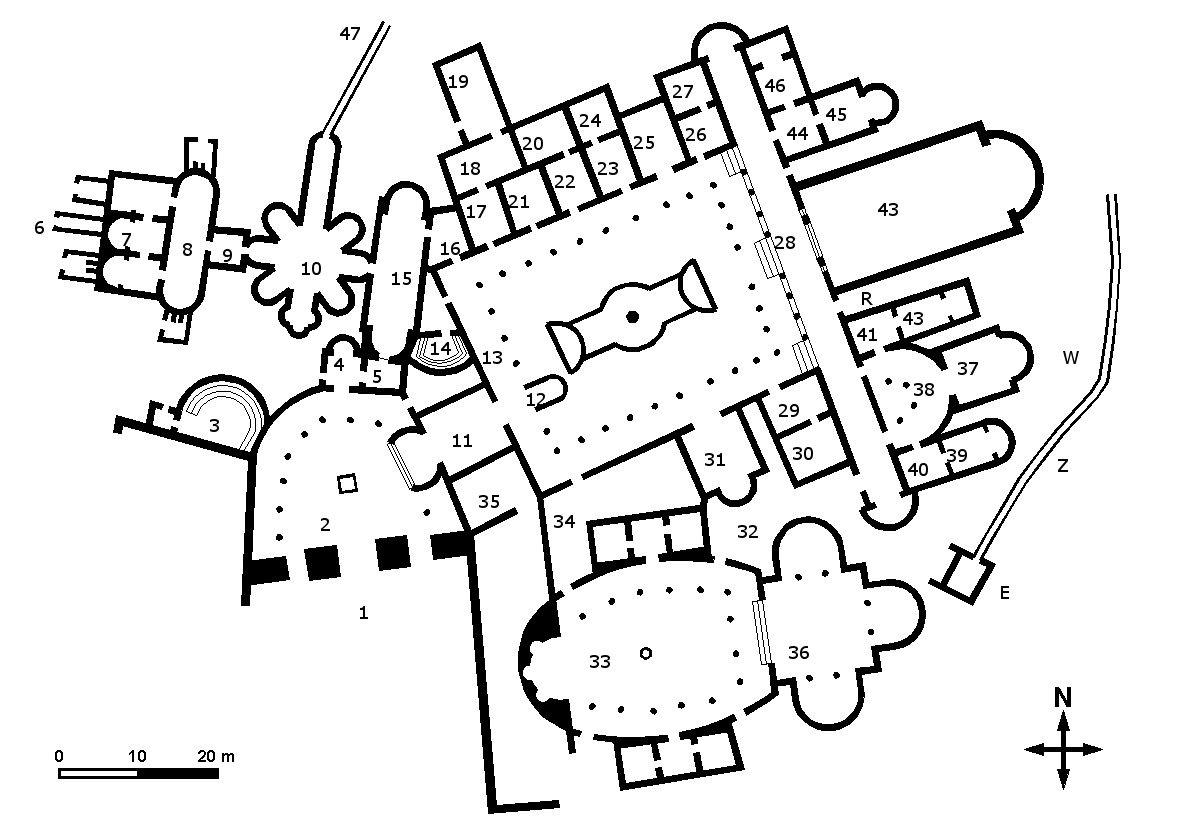 Villa Romana del Casale